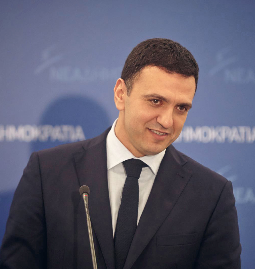 Vassilis Kikilias